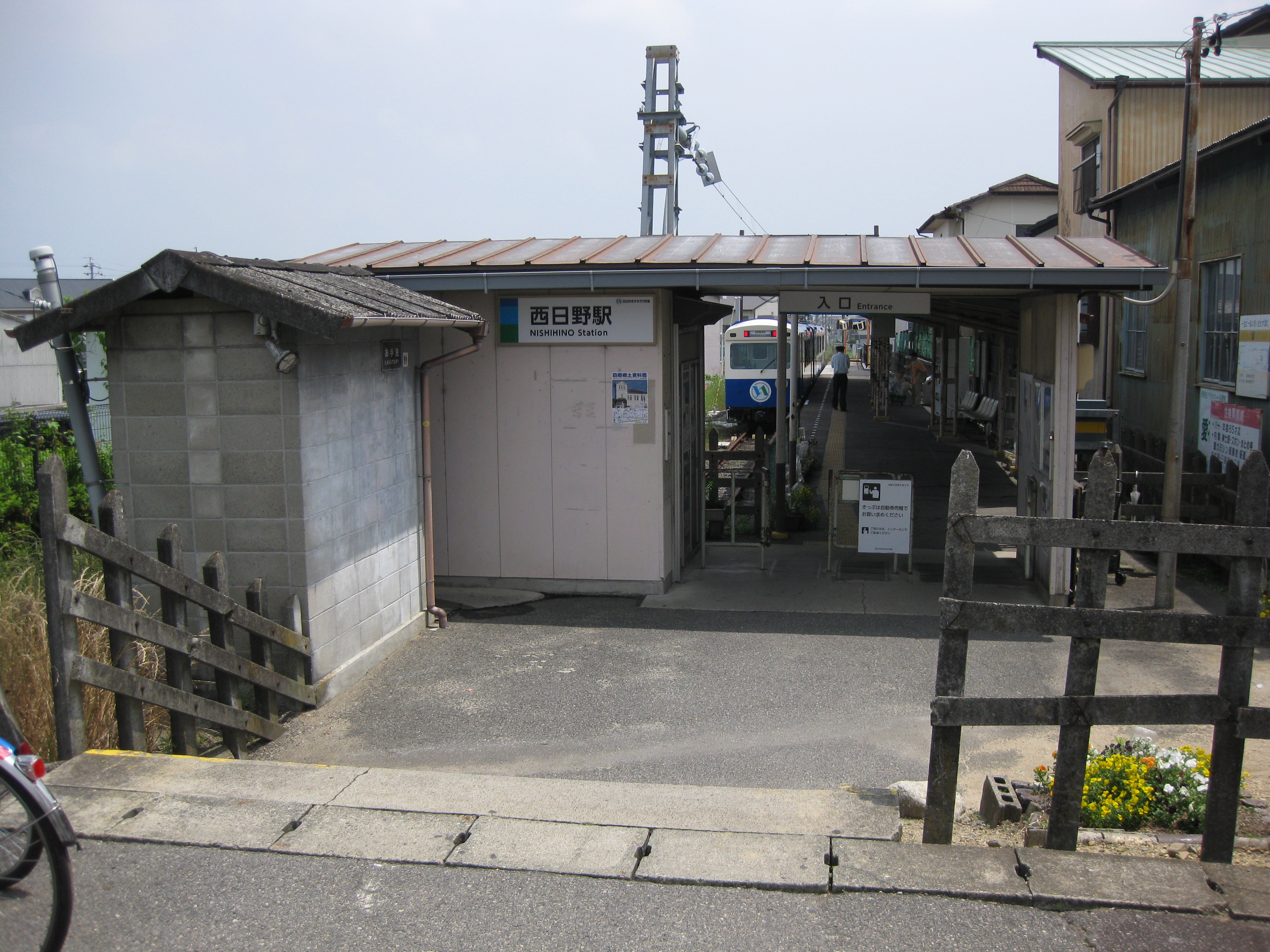 あすなろう鉄道転換後のja:西日野駅